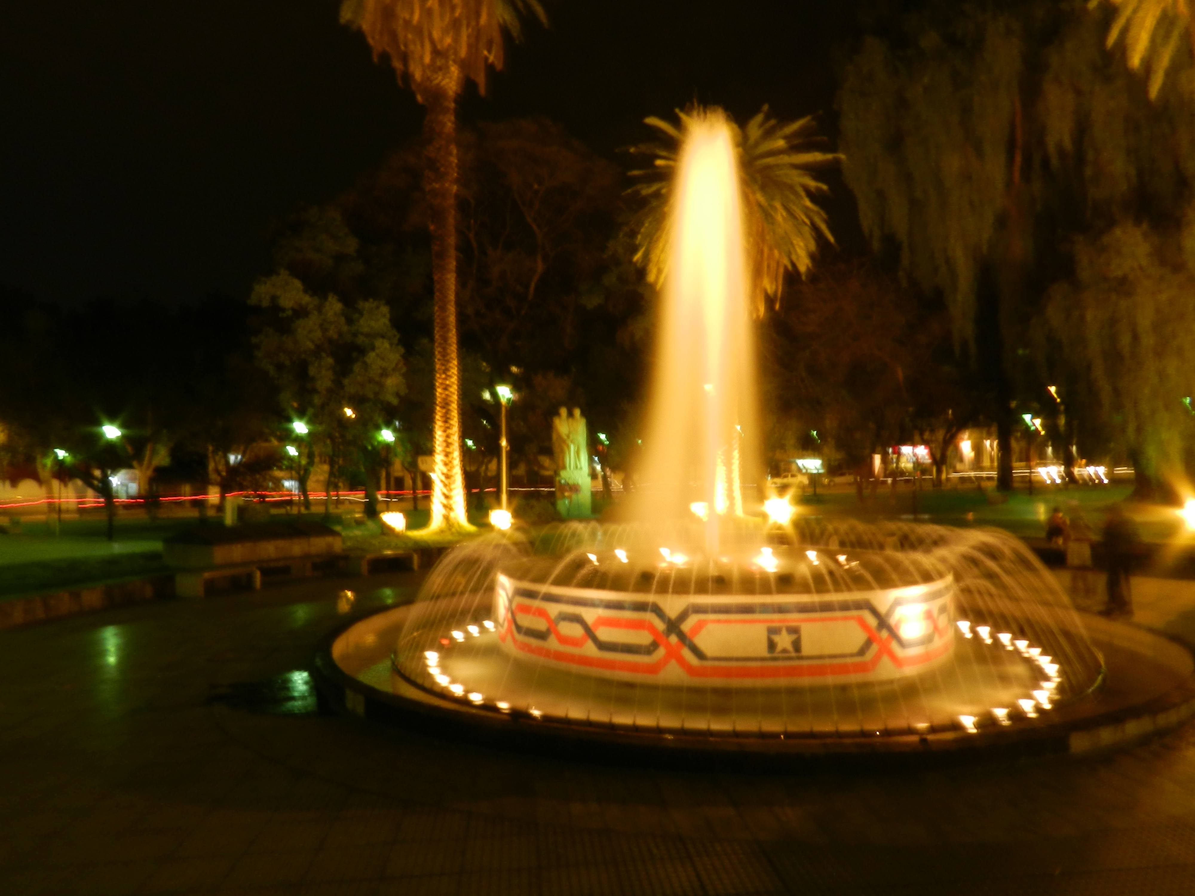 Detalle de la fuente